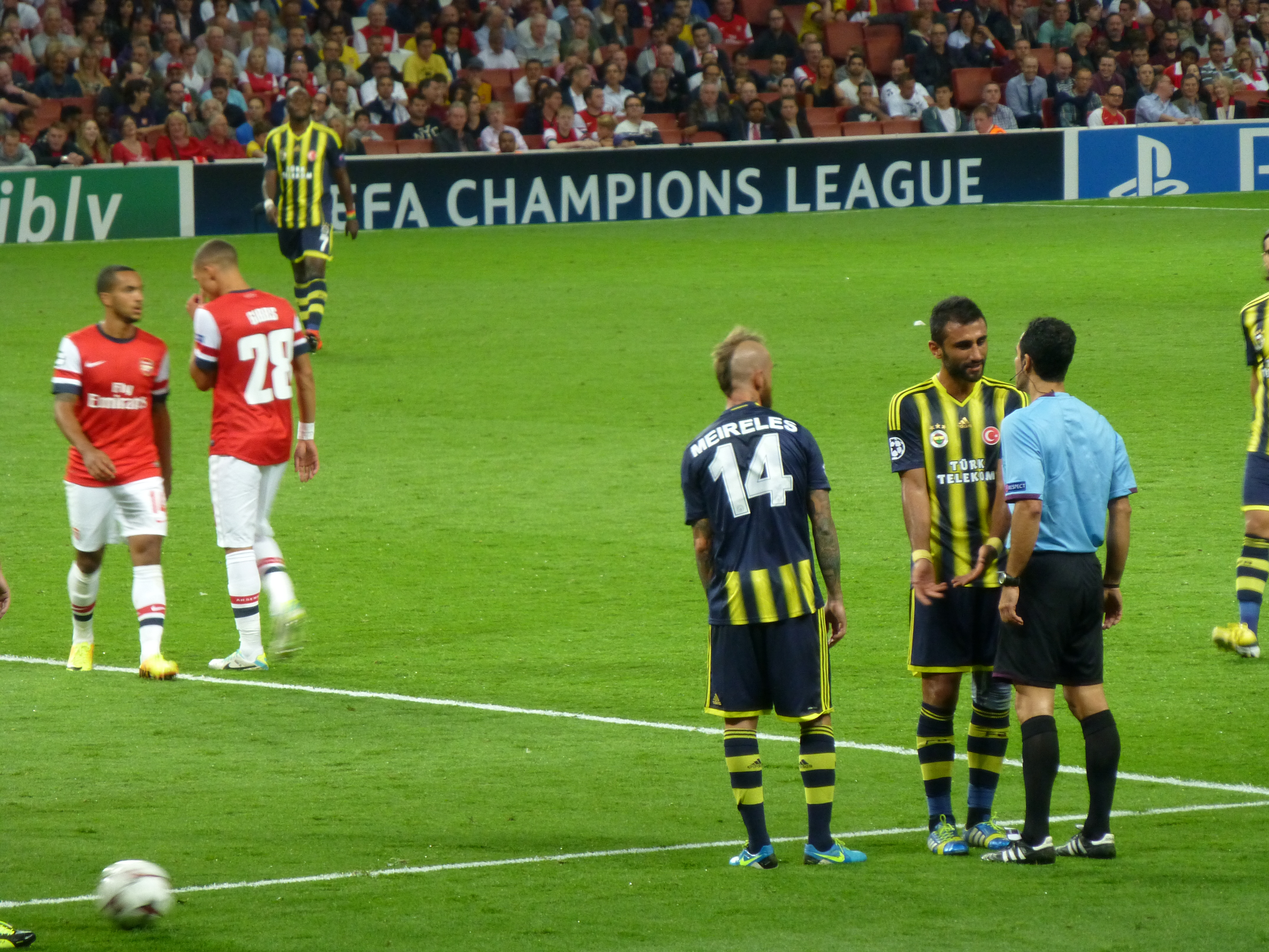 Arsenal vs Fenerbahce